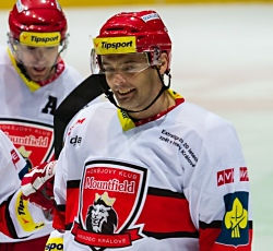 Jaroslav Kudrna